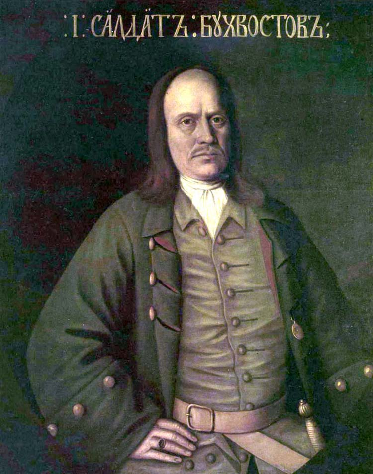 Неизвестный художник. Портрет майора С.Л. Бухвостова. Первая четверть XVIII в.